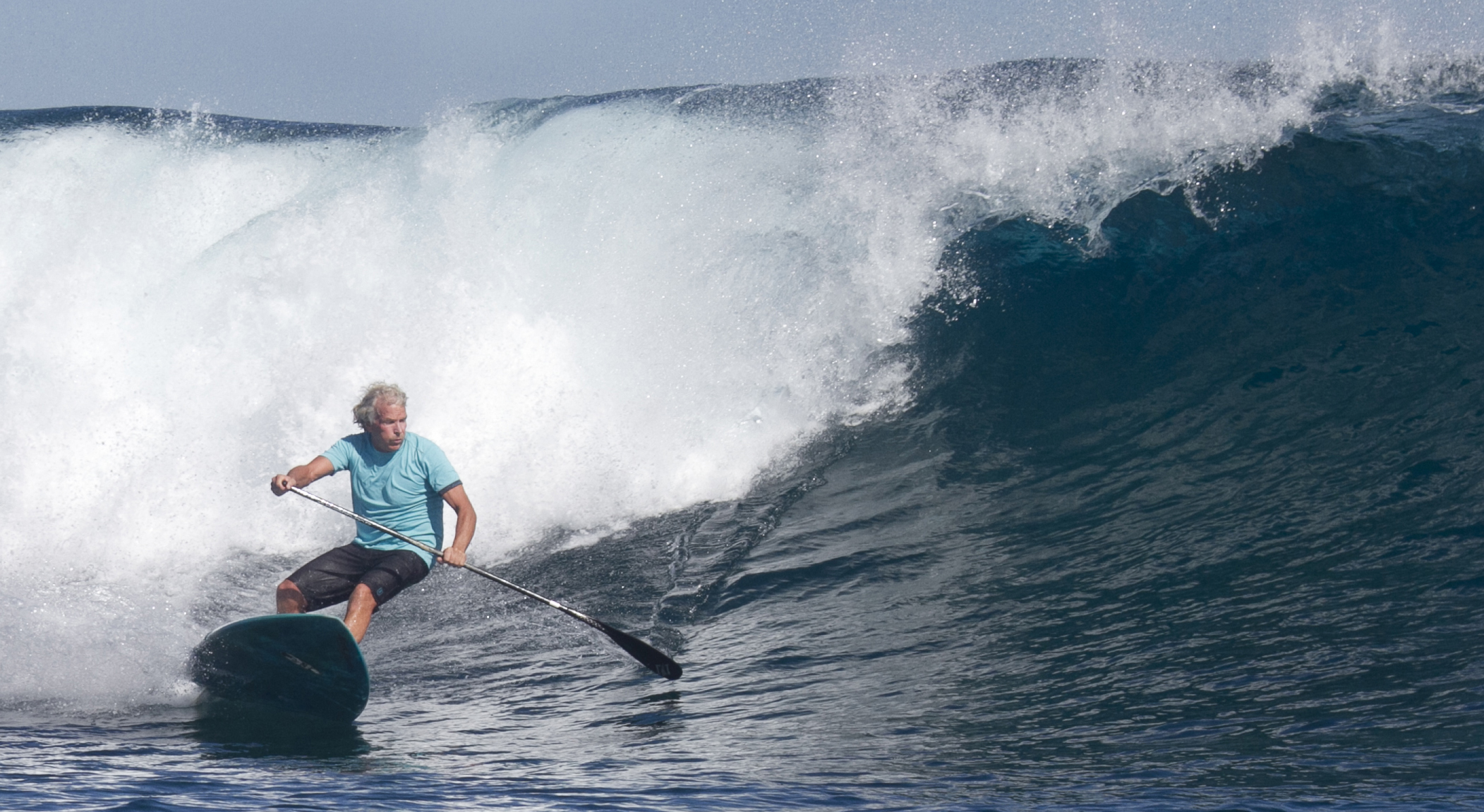 SUP-Session 2012